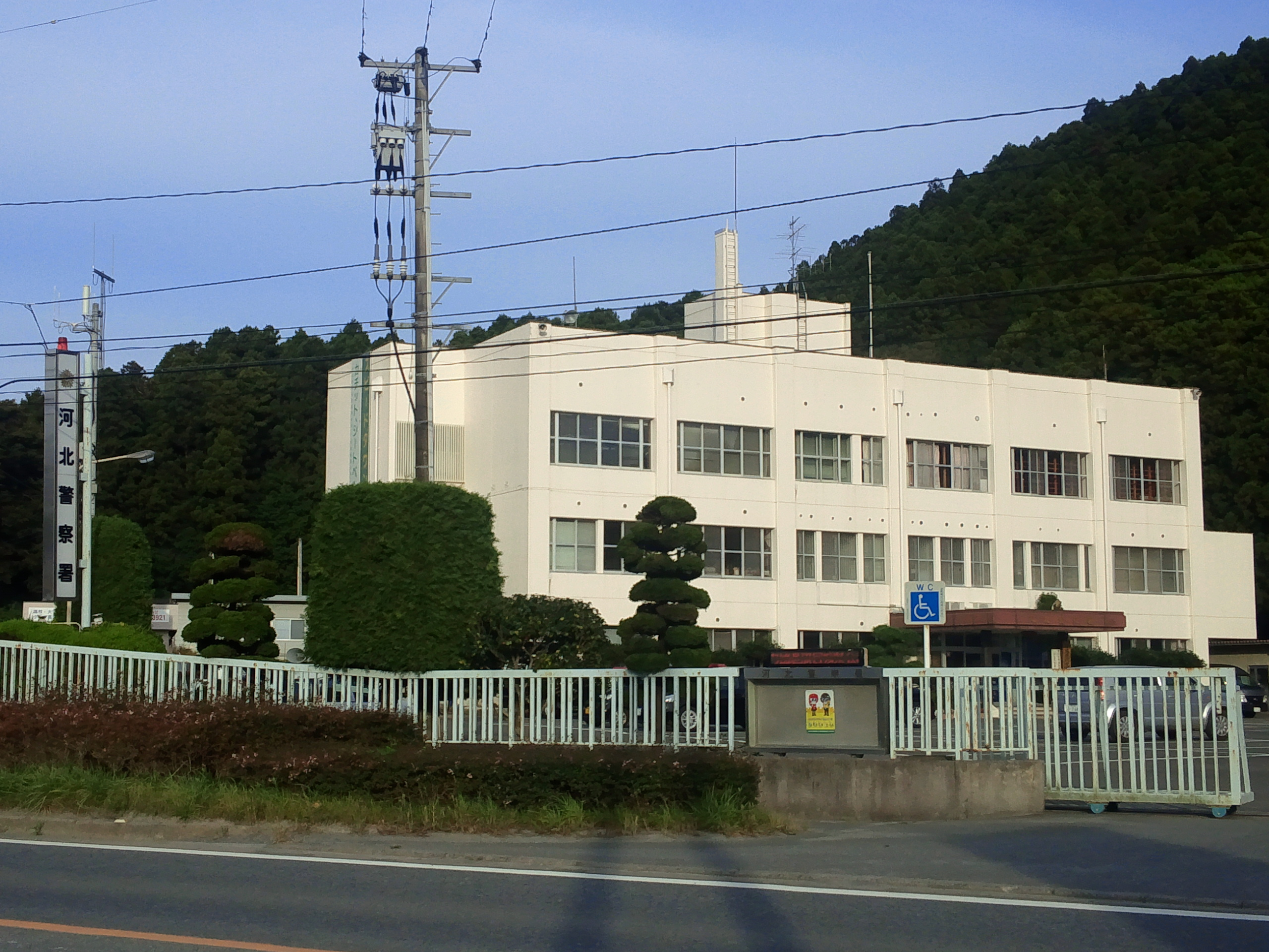 宮城県警察河北警察署庁舎